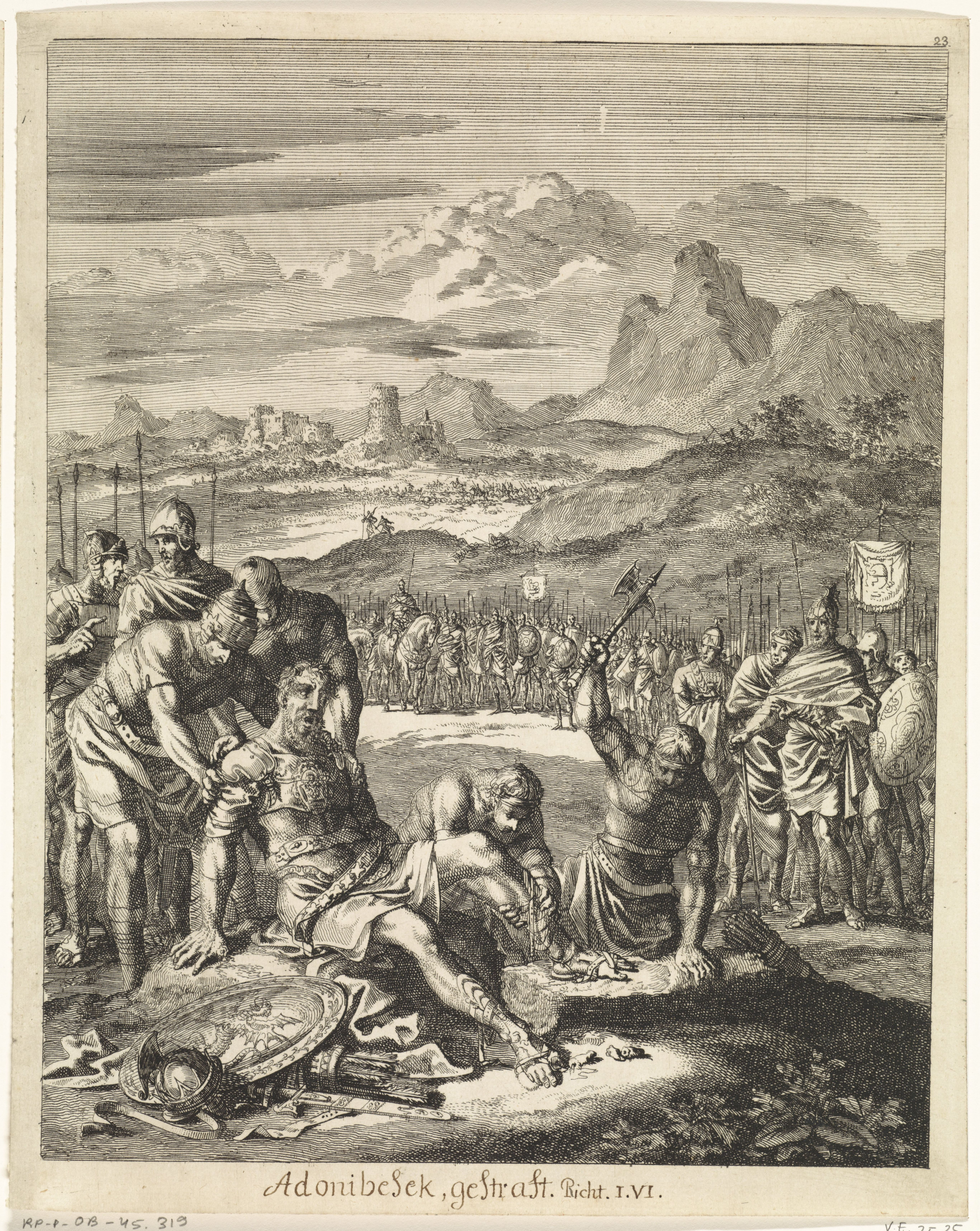 IdentificatieTitel(s): Verminking van AdonibezekObjecttype: prent Objectnummer: RP-P-OB-45.319Catalogusreferentie: Van Eeghen 3525Opschriften / Merken: verzamelaarsmerk, verso, gestempeld: Lugt 2228VervaardigingVervaardiger: prentmaker: Jan Luykenuitgever: Christoph WeigelPlaats vervaardiging: AmsterdamDatering: 1708Fysieke kenmerken: ets; proefdrukMateriaal: papier Techniek: etsenAfmetingen: blad: h 252 mm × b 200 mmToelichtingProefdruk van een prent welke is opgenomen als illustratie in: Historiae Celebriores Veteris Testamenti. Christoph Weigel, 1708.OnderwerpWat: Adoni-bezek is caught; his thumbs and his great toes are cut offVerwerving en rechtenVerwerving: onbekendCopyright: Publiek domein